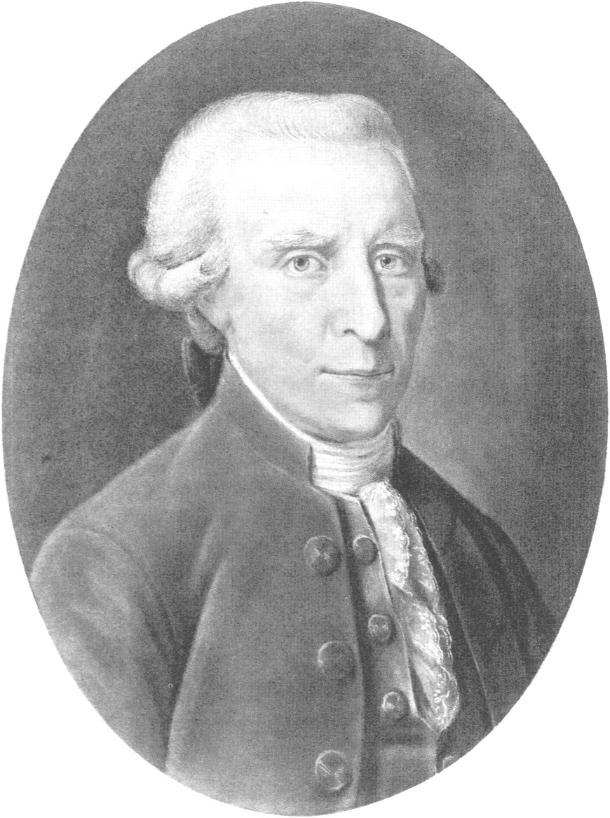 Christian Friedrich Voß (1722–1795)